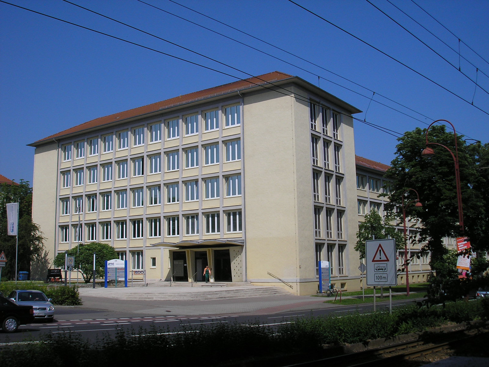 Die ehemalige Kali-Kombinatsverwaltung (heute Bürohaus) in der Arnstädter Straße in Erfurt.